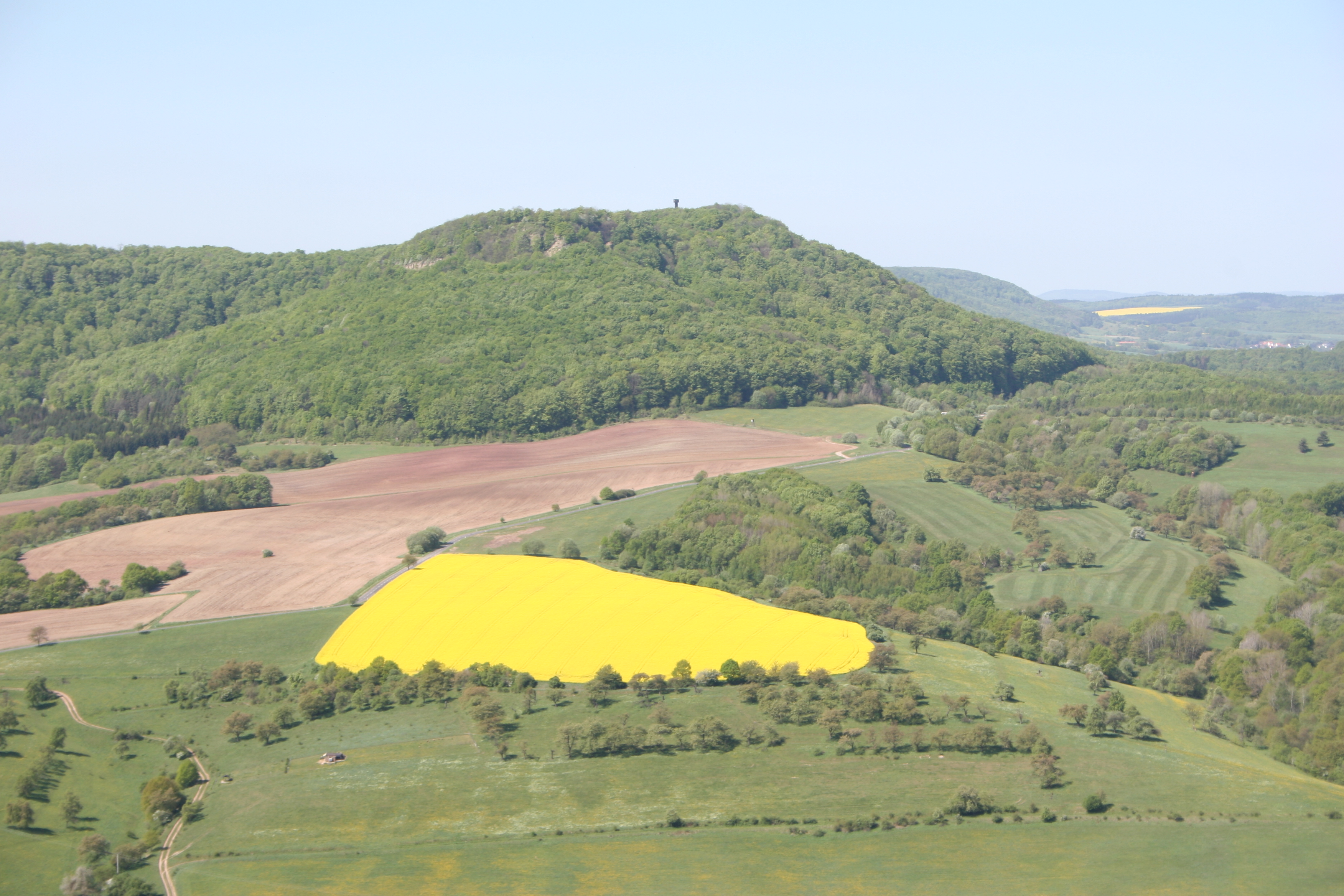 Heldrastein von der schönen Aussicht , weisen Bank (Osten) im April 2007 aus fotografiert